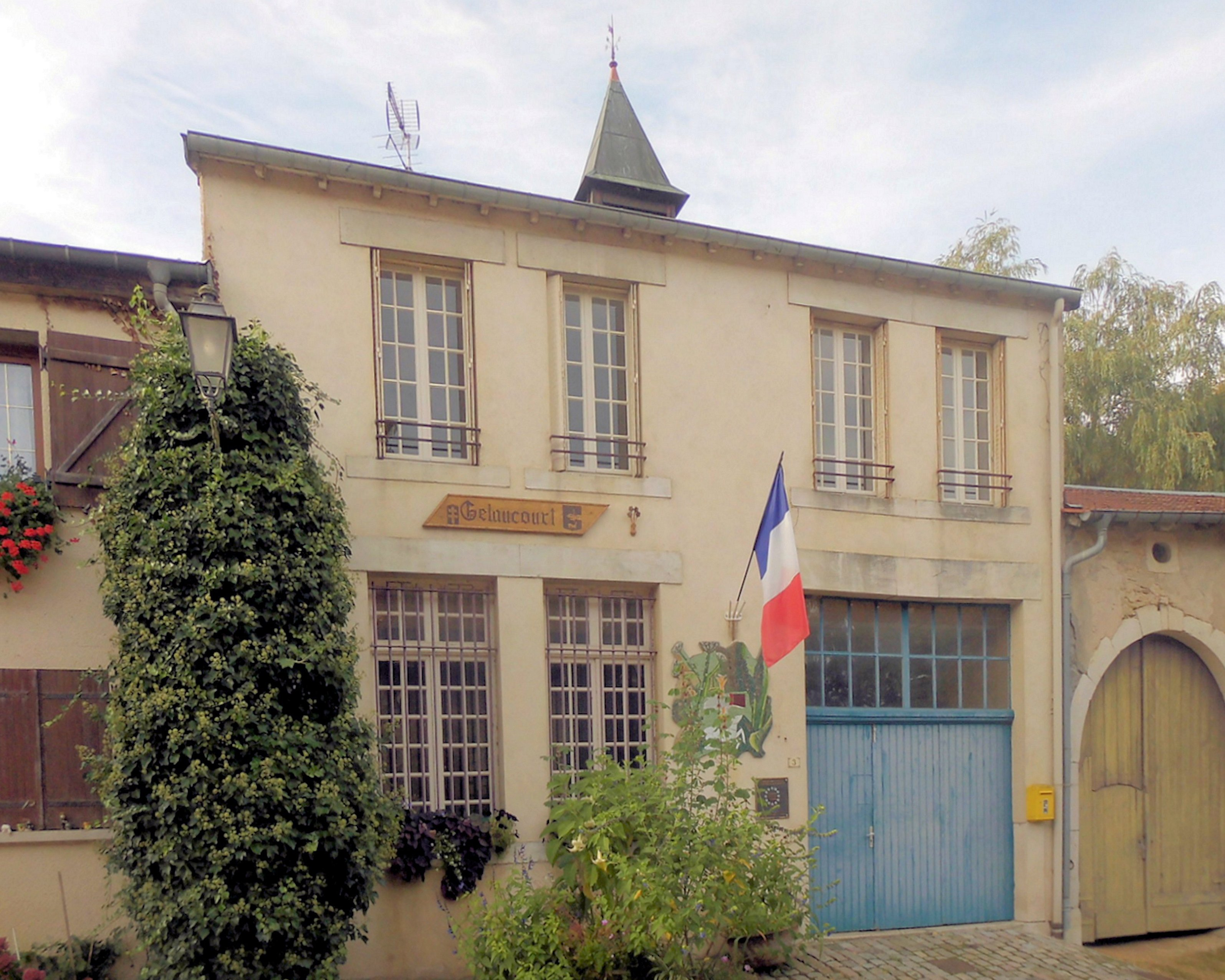 La mairie de Gélaucourt